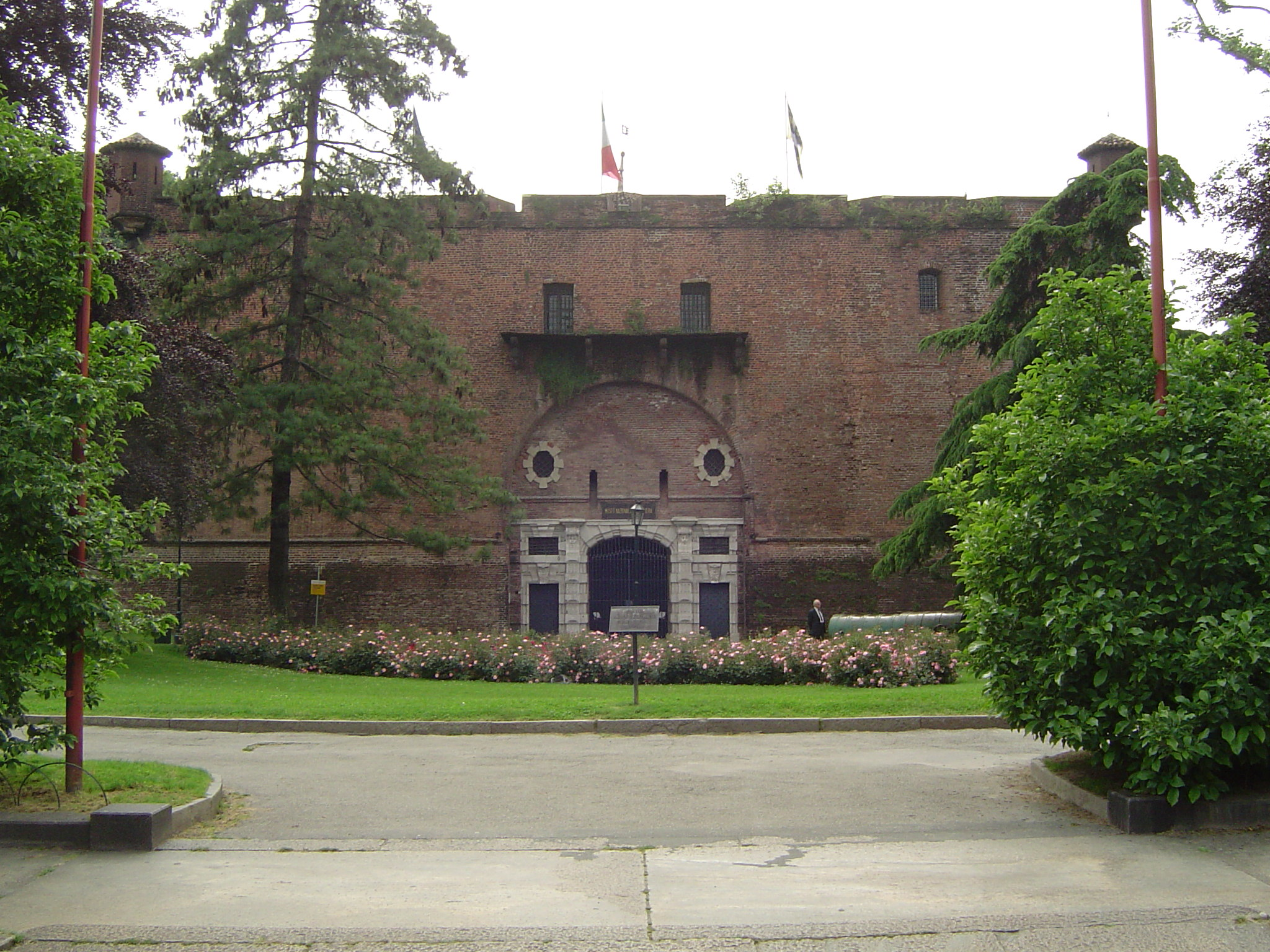 Museo Nazionale dell'Artiglieria di Torino visione d'insieme